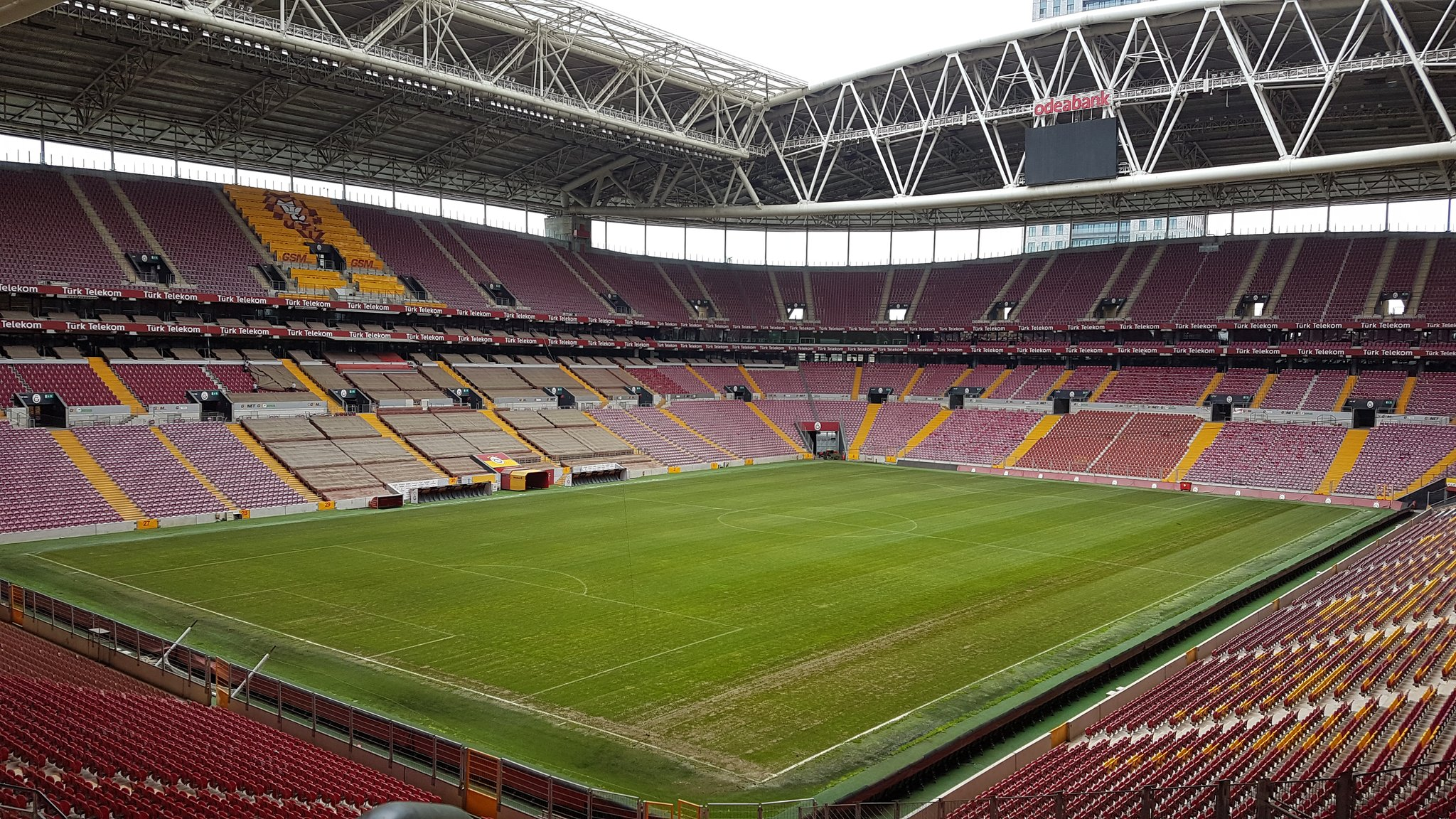 Galatasaray Arena_South-East Corner